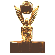 Copa Euroamericana